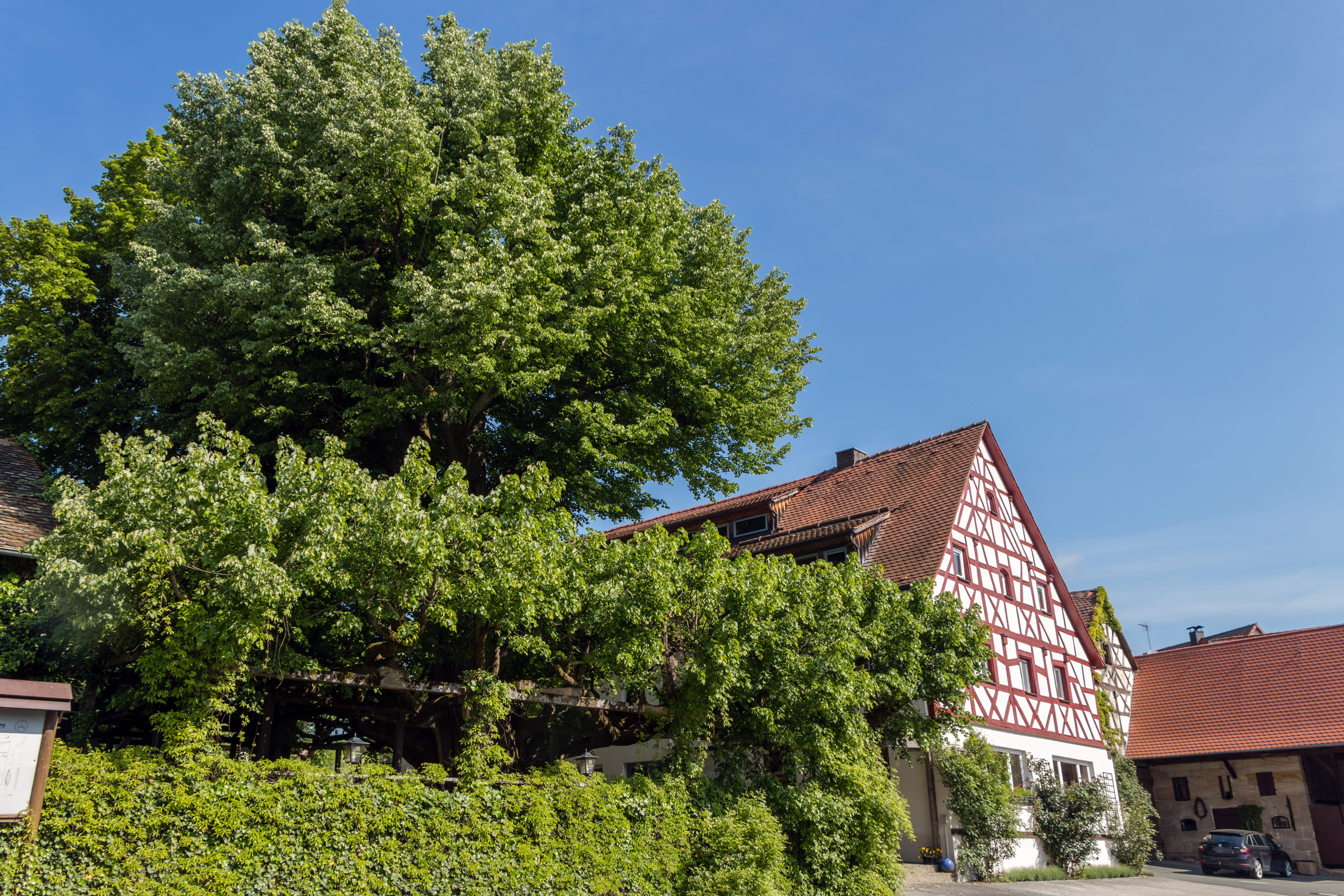 Schirmlinde, Kersbach, Naturdenkmal